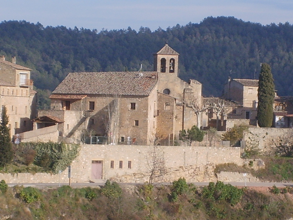 Talamanca (Bages)